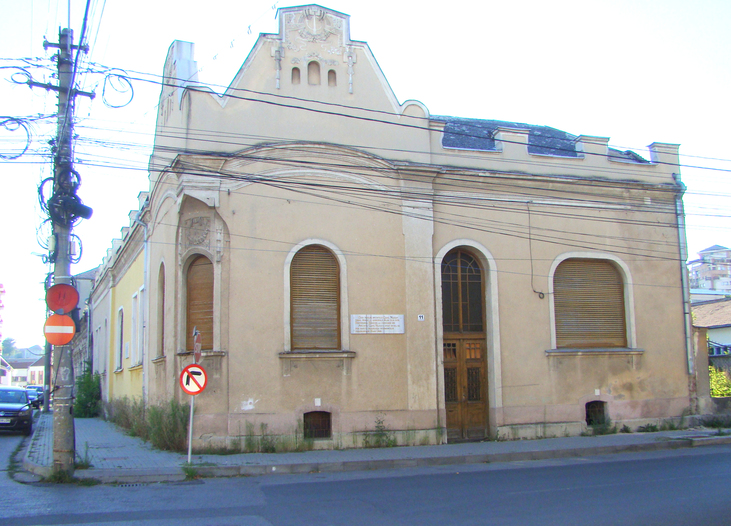 Casa Camil Velican, Str. Trandafirilor 11, municipiul Alba Iulia